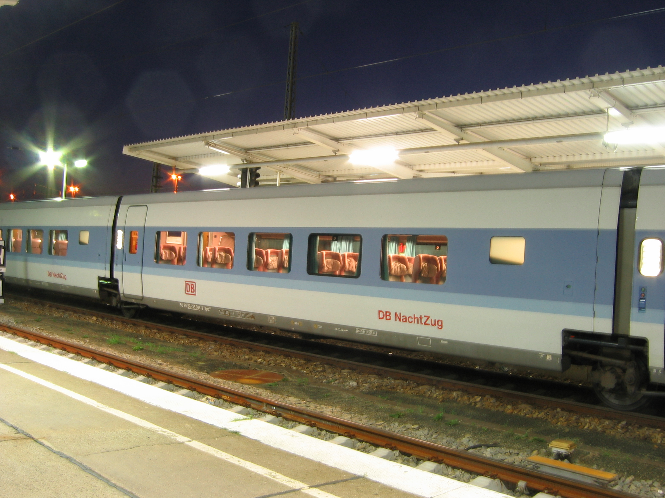 Zug der DB Night (Talgo) am Bahnhof Berlin- Lichtenberg